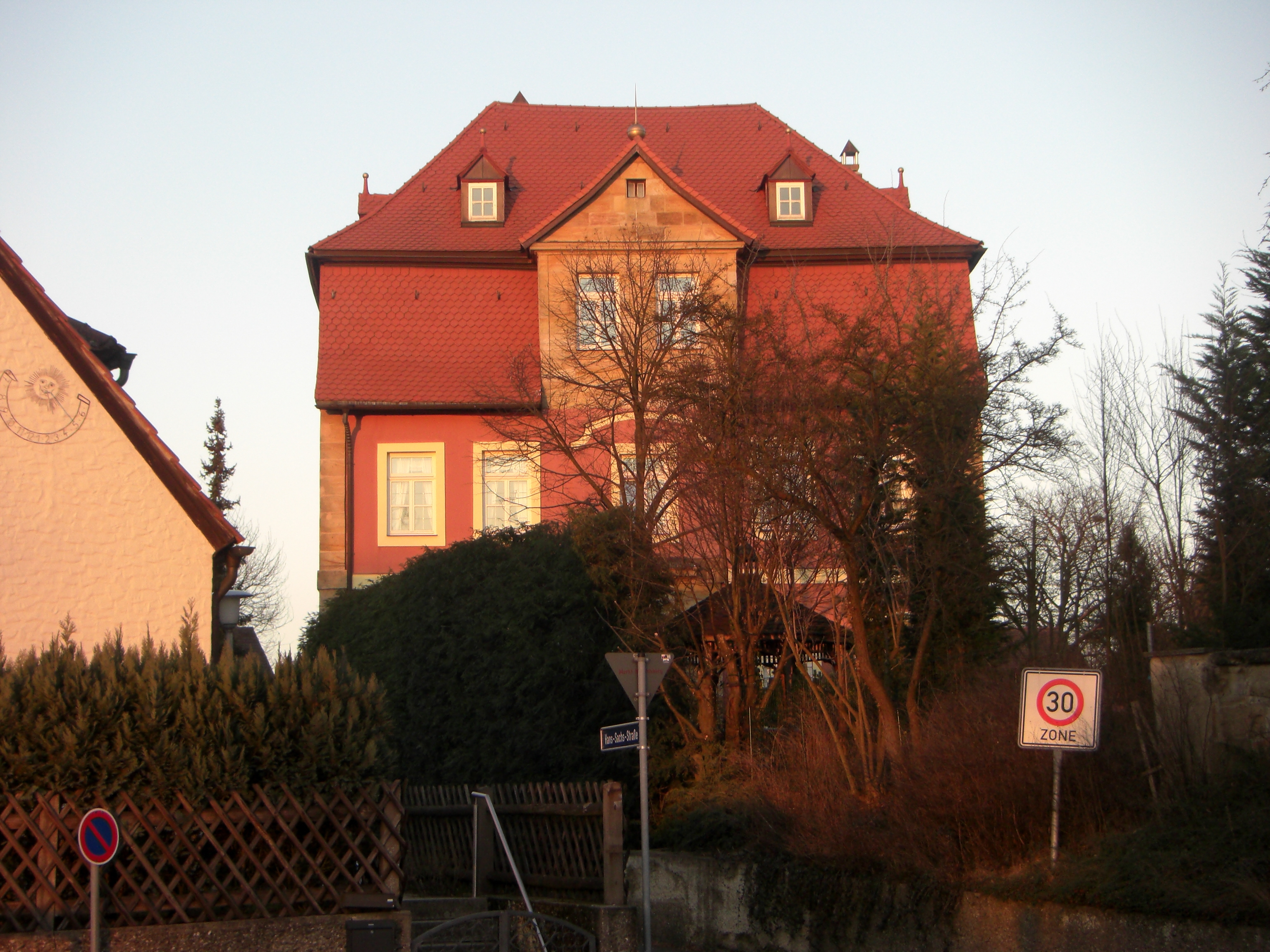 Gelbes Schloss in Heroldsberg, Hans-Sachs-Straße 2, Landkreis Erlangen-Höchstadt, Mittelfranken, Bayern, DeutschlandMassivbau mit Mansarddach und Zwerchhausrisalitenum 1580 von den Geuder von Heroldsberg erbaut This is a photograph of an architectural monument.